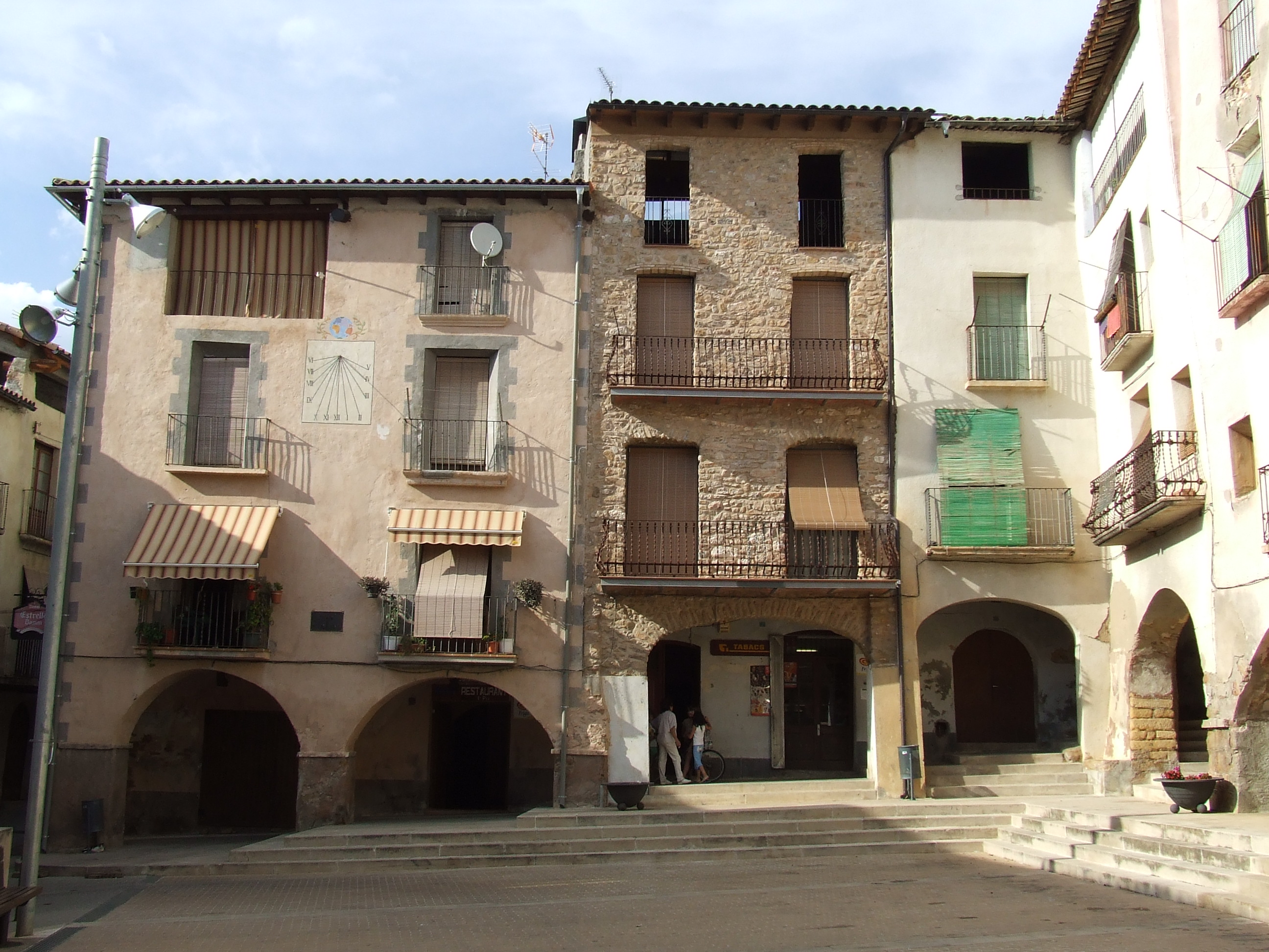 Plaça Major de Talarn (Pallars Jussà)